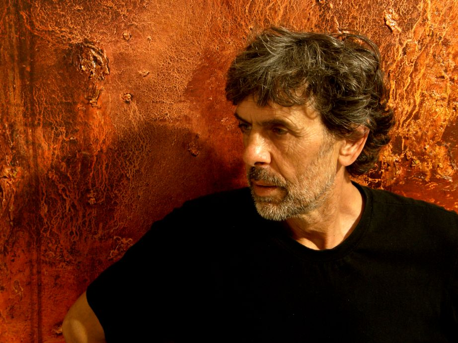 Porträt aus dem Jahr 2006